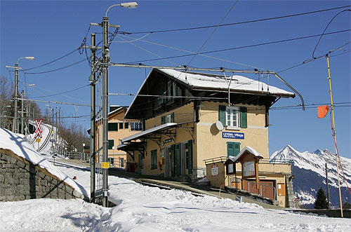 Bahnhof Leysin-Village / La gare Leysin-Village